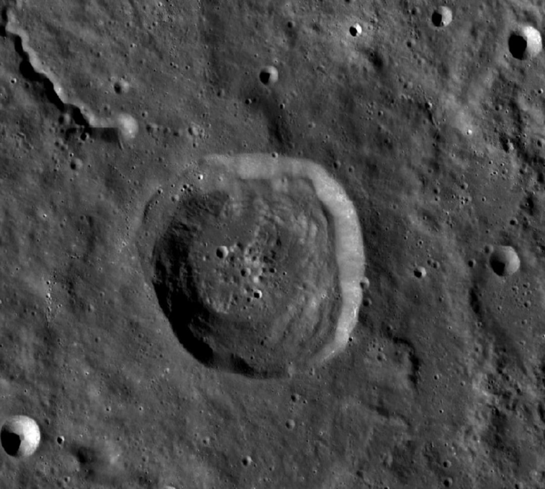 Cráter lunar Sharp. (Imagen LRO)